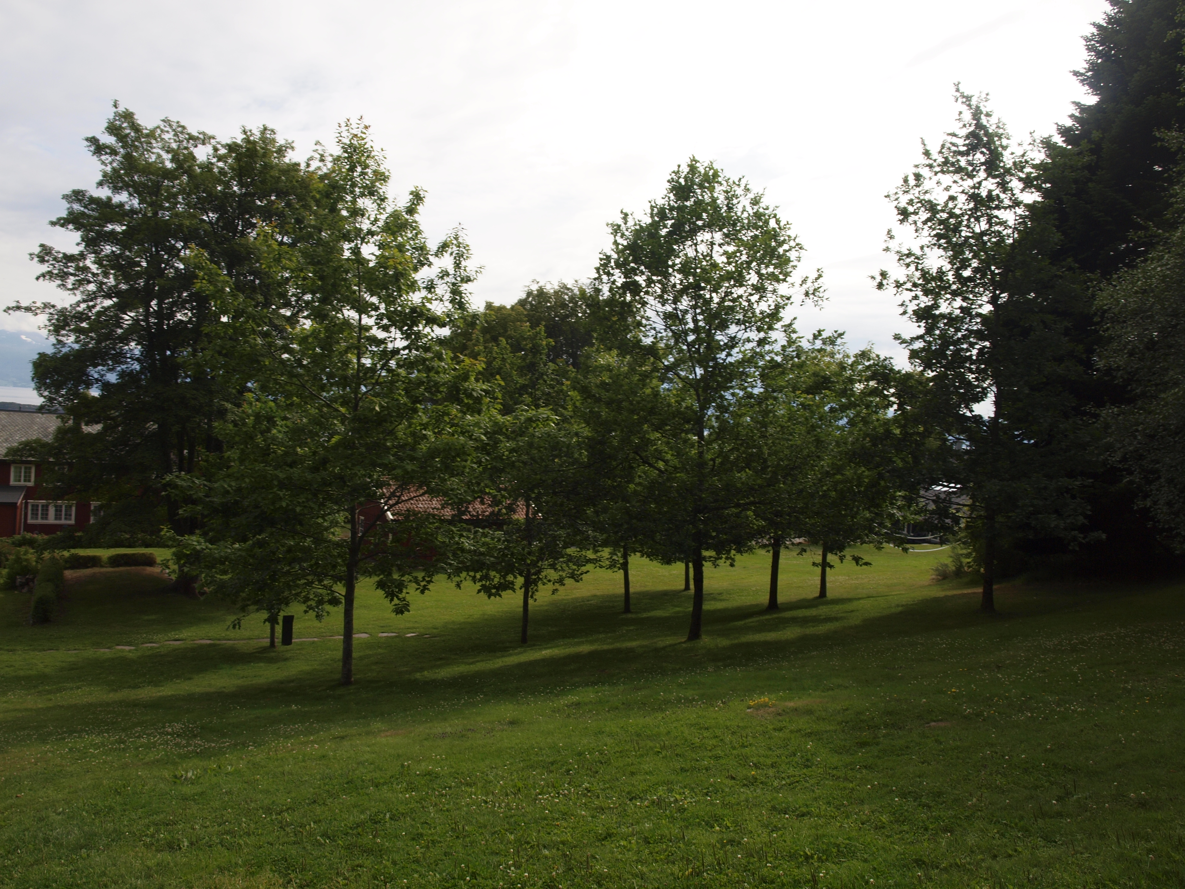 Fredslunden in Molde